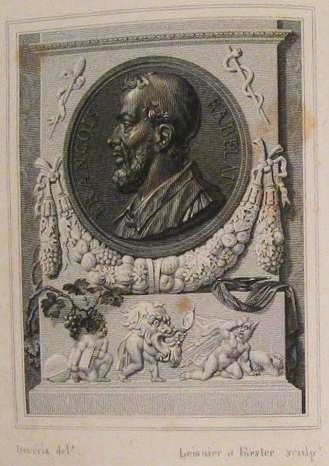 Rabelais de profil, en-tête gravé par Nicolas-Auguste Leisnier et François Forster d'après un dessin d'Achille Devéria, pour l'édition Dalibon.